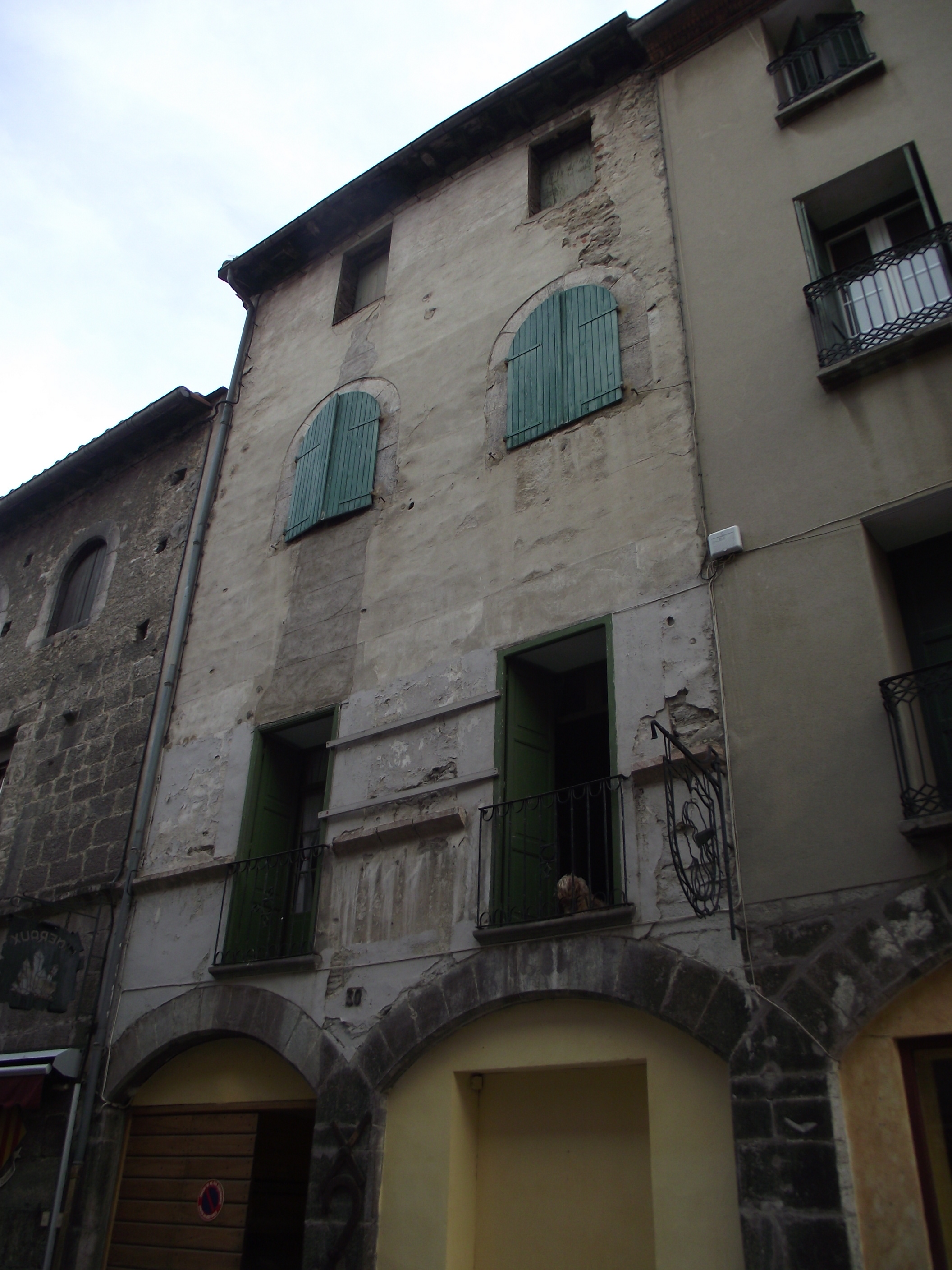 Casa Masdéu (Vilafranca de Conflent)